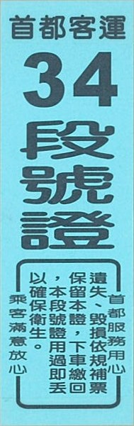 首都客運段號證藍色版